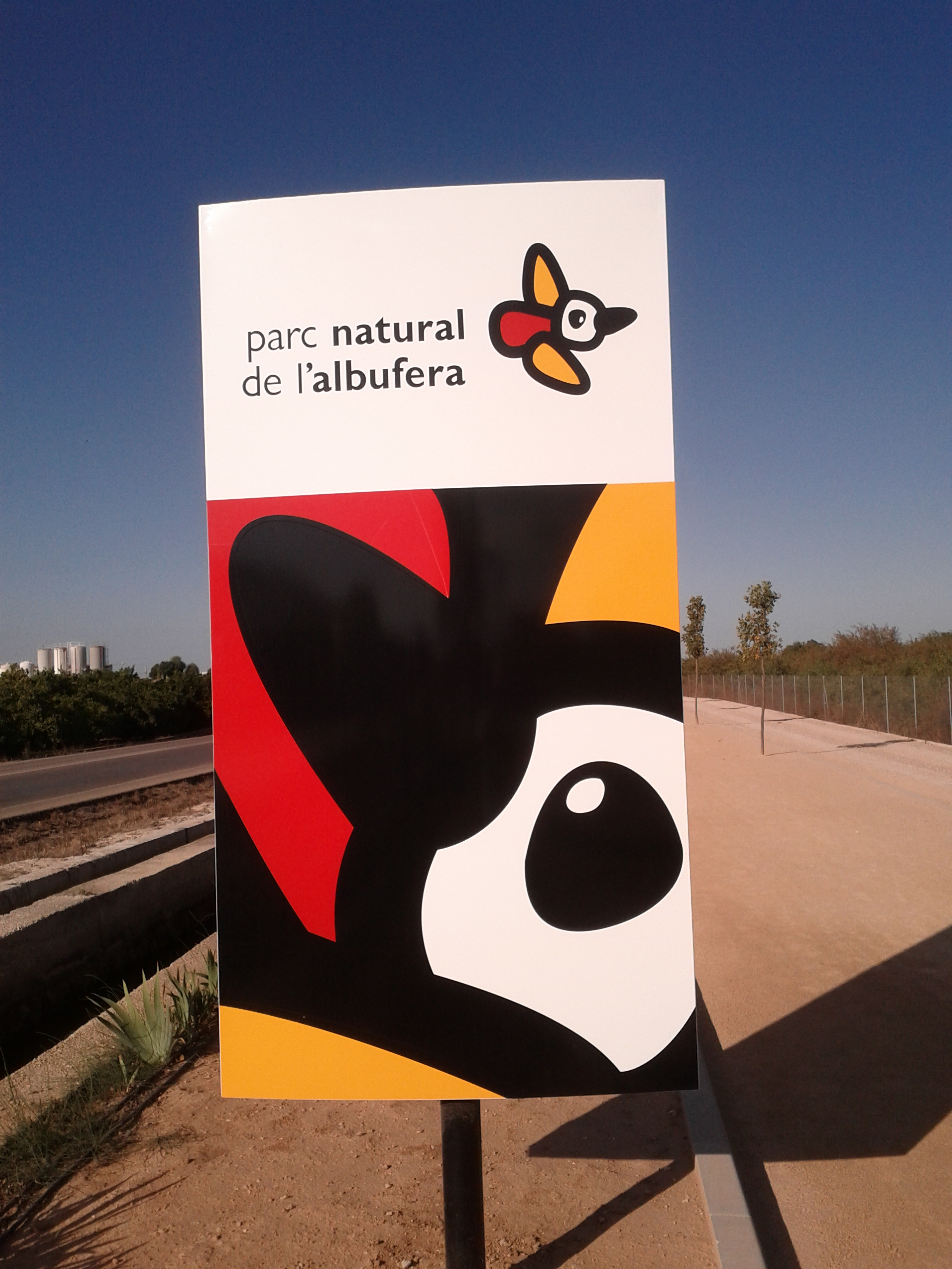 Cartell del Parc Natural de l'Albufera a Algemesí (València, Espanya).